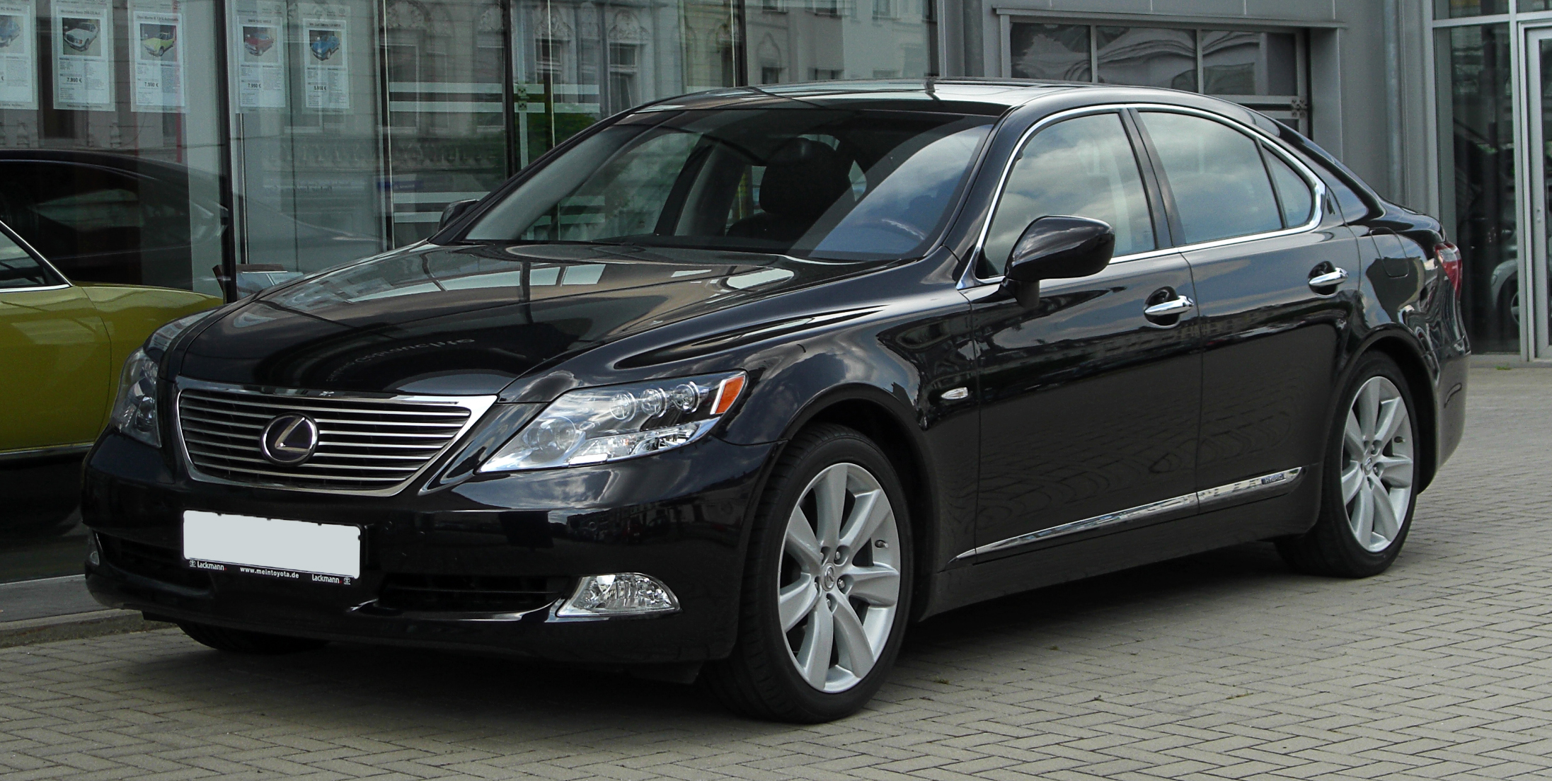 Lexus LS 600h (IV)